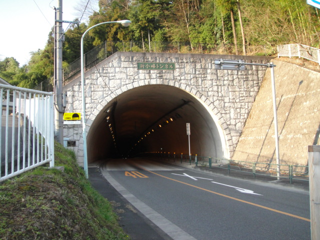 東京都八王子市〜あきる野市の新小峰トンネル。